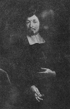 Jiří Ignác Pospíchal (1634 - 1699), Velmistr křižovníků s červenou hvězdou.